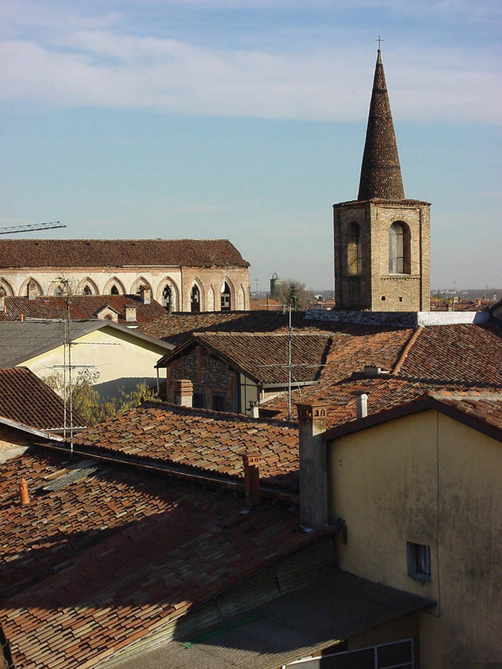 Panoramica centro storico Martinengo. Visibile il campanile del convento di santa Chiara delle Clarisse, costruito nel 1474